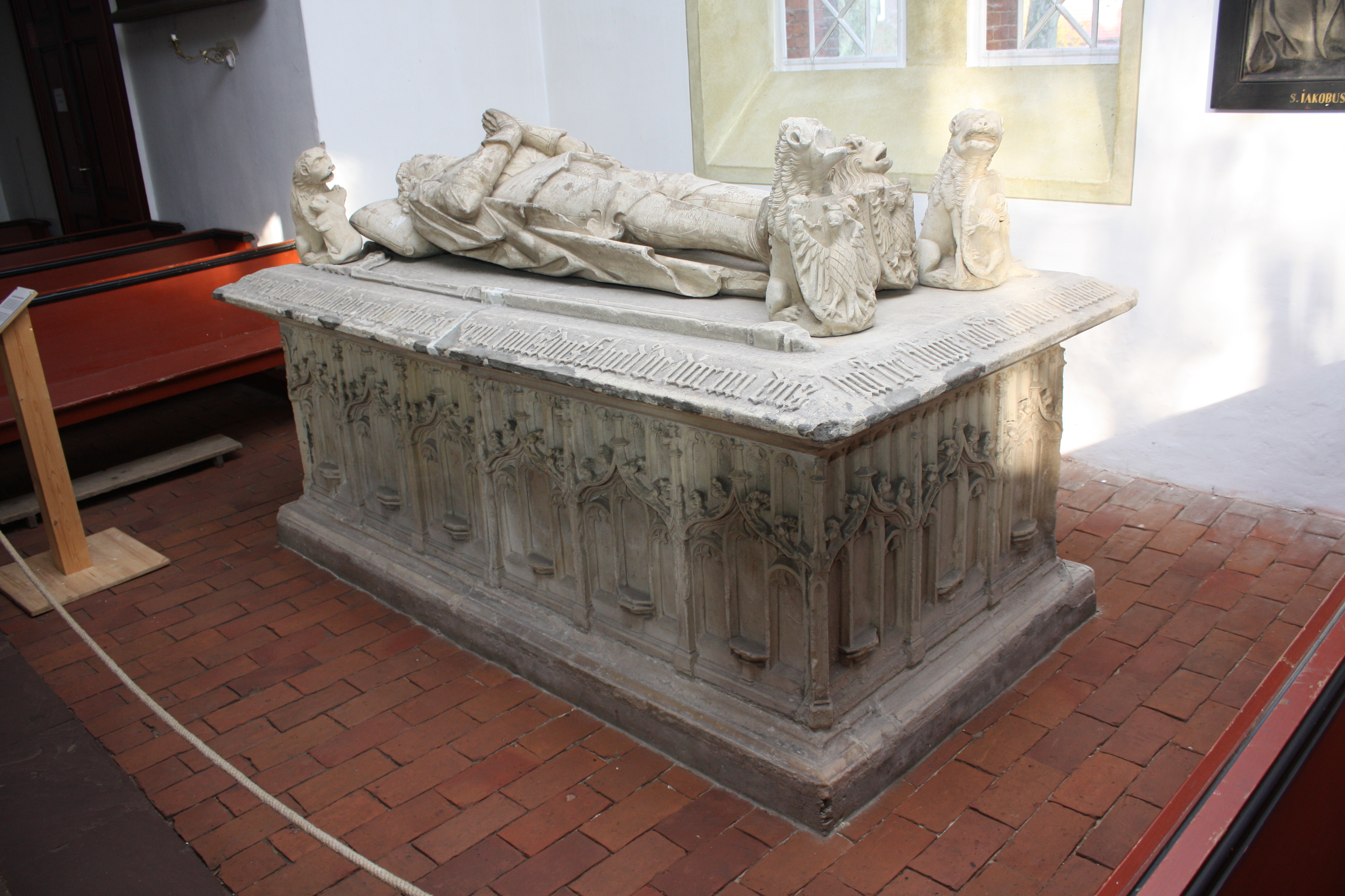 Sarkophag des Sibet Attena in St. Magnus in Esens